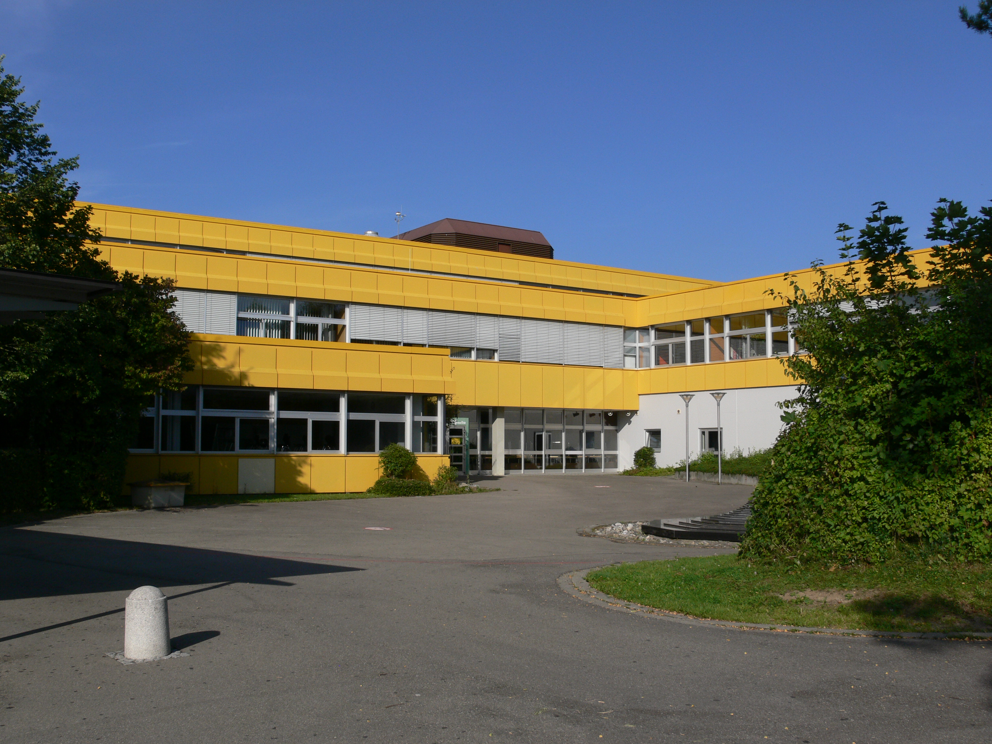 Ravensburg, Berufliches Schulzentrum, Eingang zur Humpisschule und zur Edith-Stein-Schule